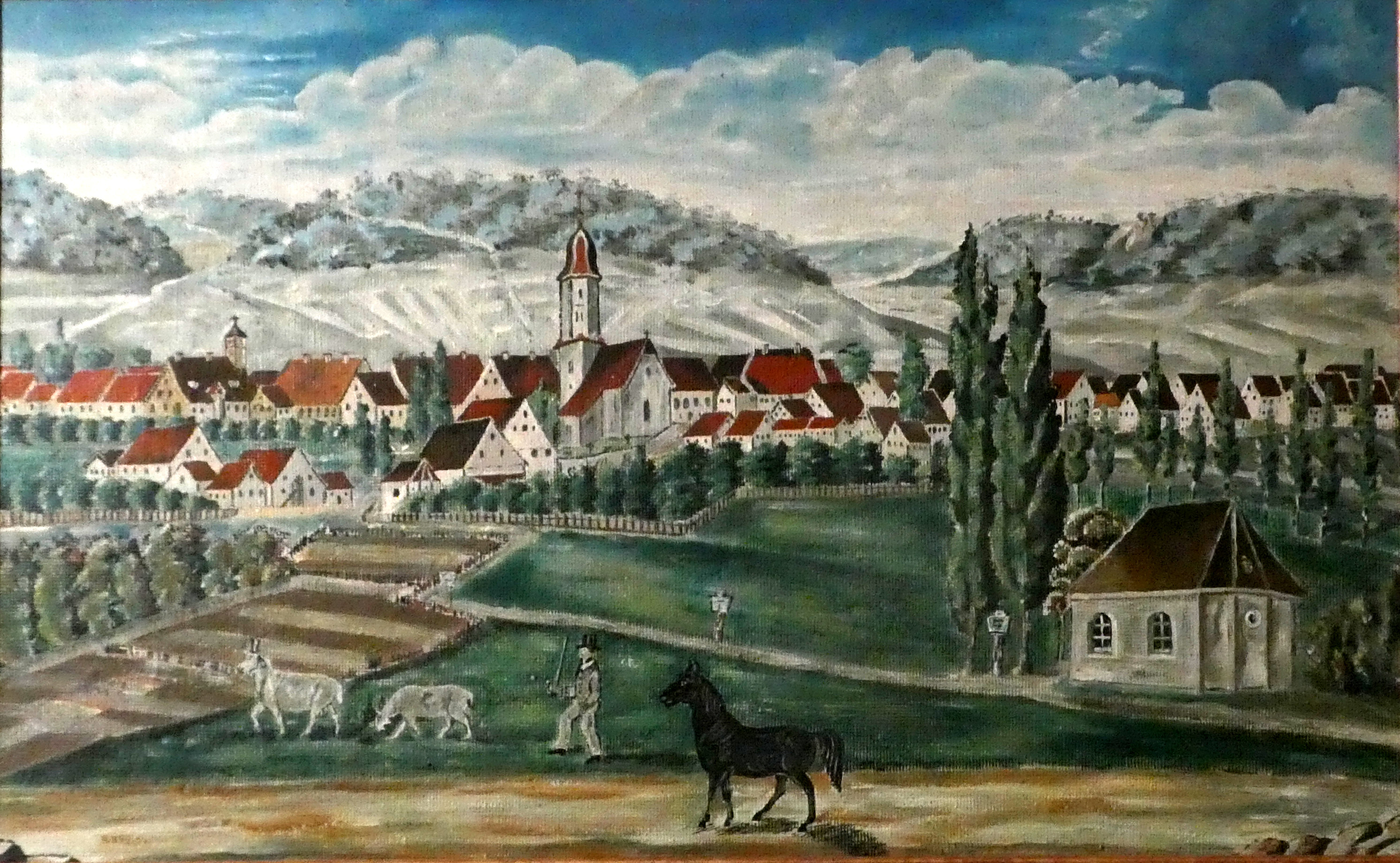 Oberkochen 1847 auf dem Gemälde eines unbekannten Künstlers. Älteste bekannte Ortsansicht, im Vordergrund die nicht mehr existierende Wiesenkapelle. Das Dorf ist mit einem Etterzaun umgeben.